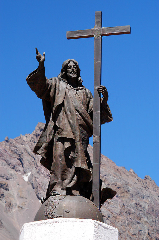 Cristo Redentor de los Andes, monumento erigido en 1904 en la frontera andina entre Argentina y Chile, a unos 4000 metros de altura, para celebrar la superación pacífica de un conflicto por cuestiones de límites que había llevado a ambos países a estar al borde de la guerra.